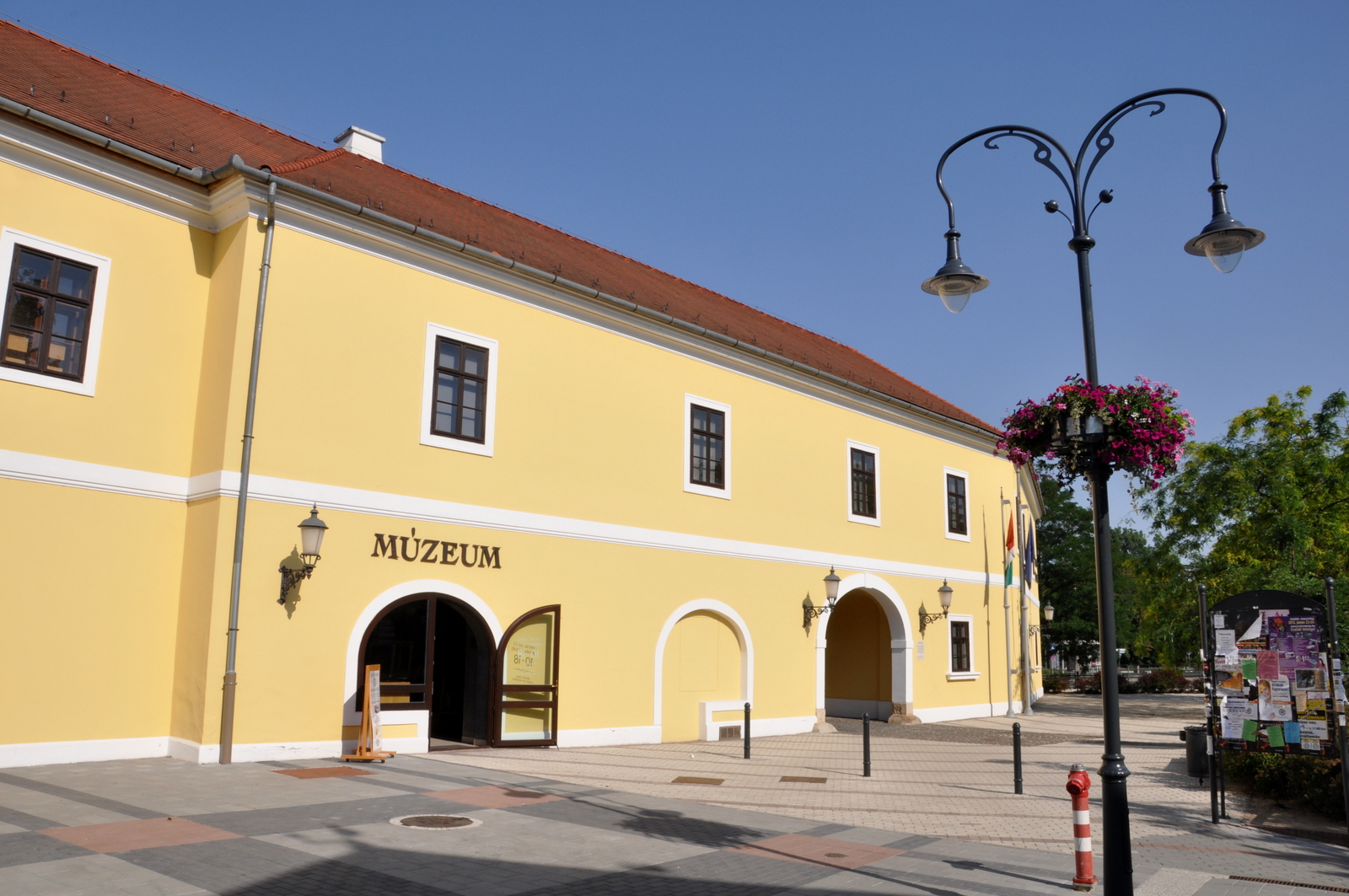 Town Museum of Gödöllő This is a photo of a monument in Hungary, Identifier: 7055